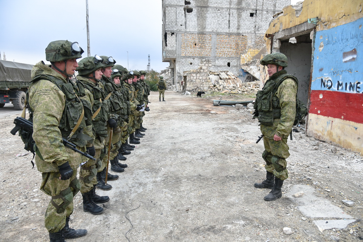 Работа сапёров Международного противоминного центра Министерства обороны России в Алеппо (Сирия)